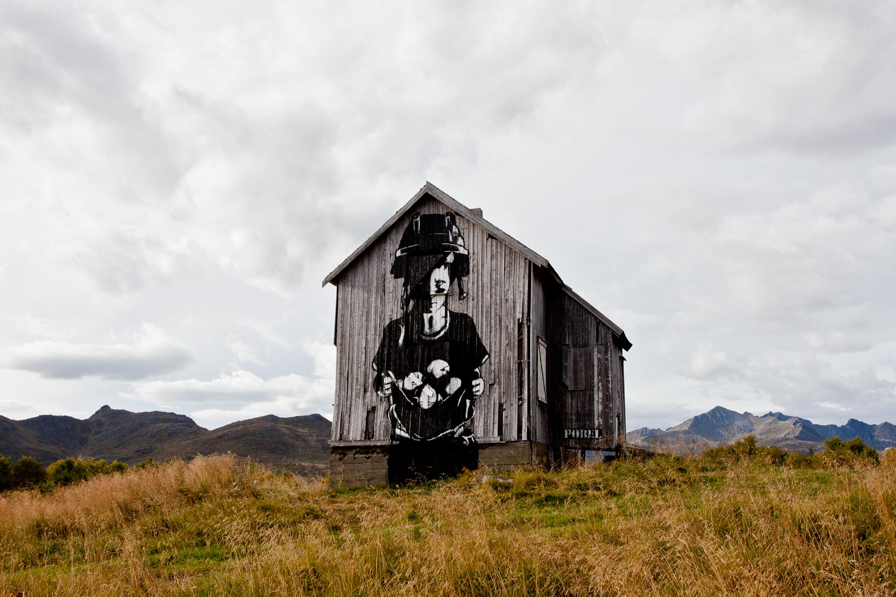 Lofoten